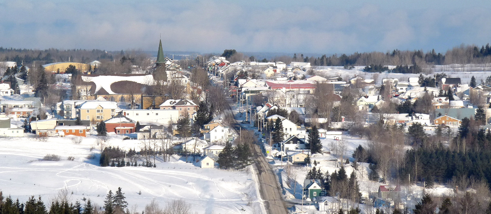 Village de Saint-Cyprien au Bas-Saint-Laurent (Québec)